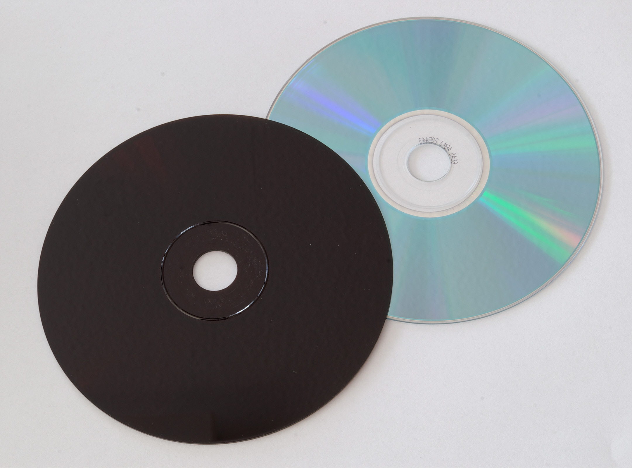 Schwarzer beschreibbarer CD-Rohling